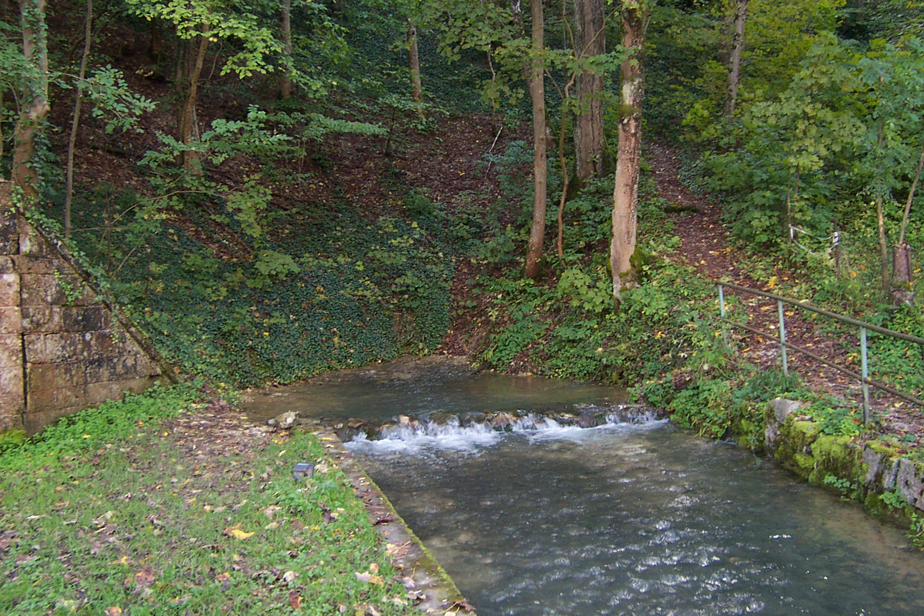 Karstspring / Karstquelle Schwarze Lauter, Schlattstall 100 m west of wateractive Cave „Goldloch" 100 m westlich von aktiver Wasserhöhle „Goldloch"